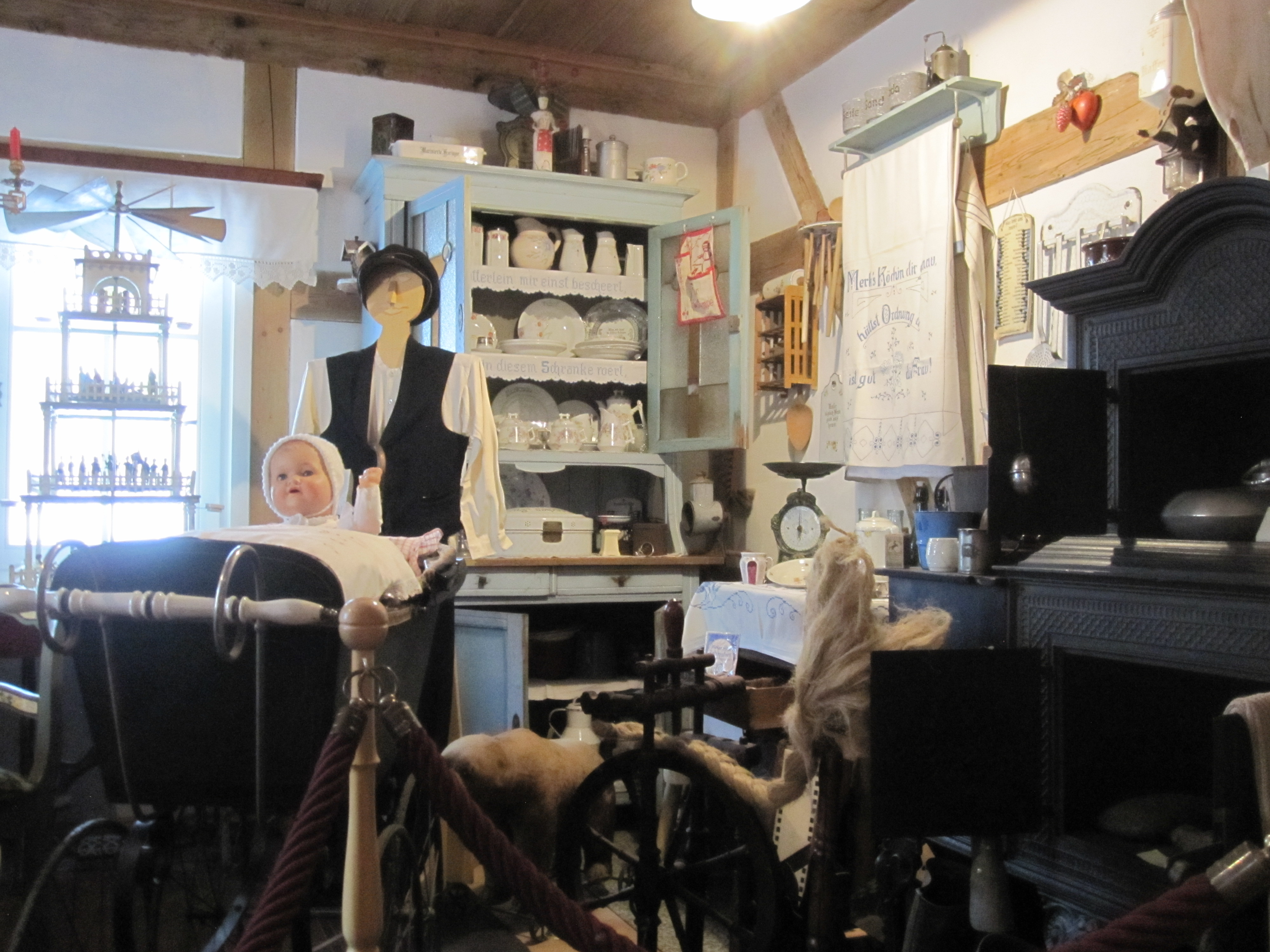 Bürsten- und Heimatmuseum Schönheide: Weihnachts-Ausstellung im Museum. Thema war 2012 „Bunt bedruckt. Krippen, Karten, Kalender, Sterne - Weihnachtliches aus Pappe und Papier“. Webseite des Museums Wohnküche der Familie eines Bürstenarbeiters.